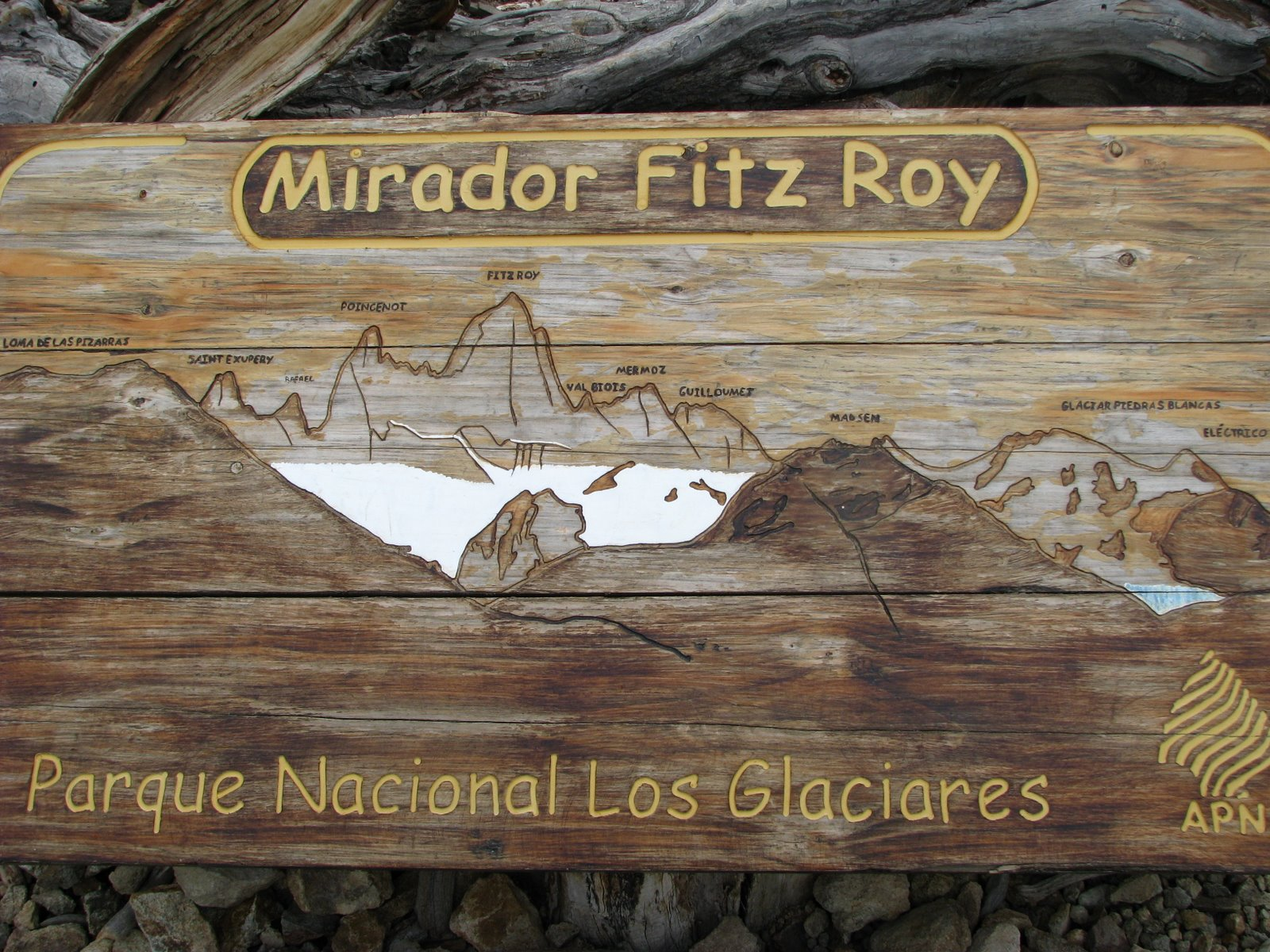 Plan présenté sur un mirador à proximité du Fitz Roy